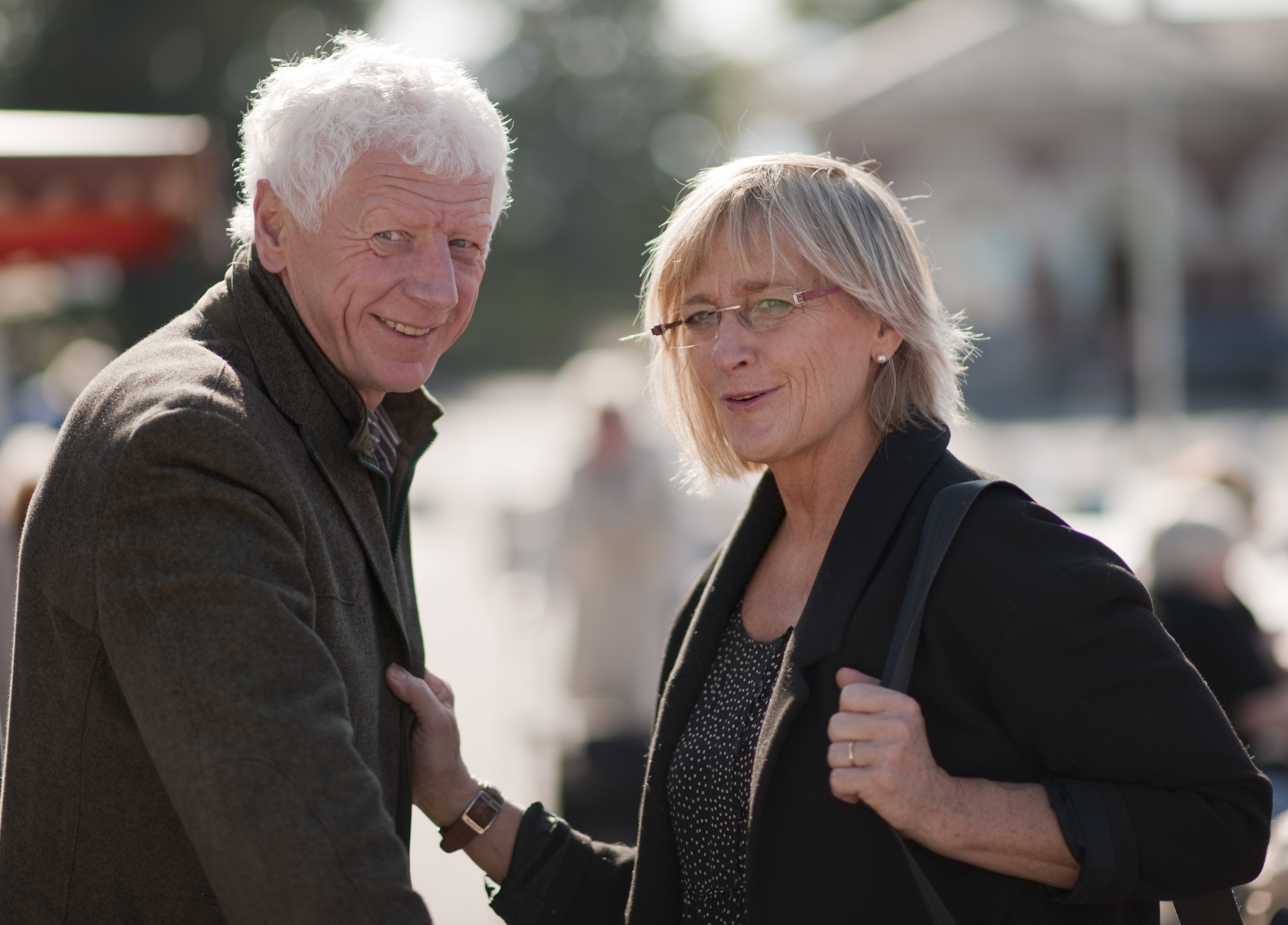 Einar Busterud and Cristel Meyer foto: Christoffer Horsfjord Nilsen